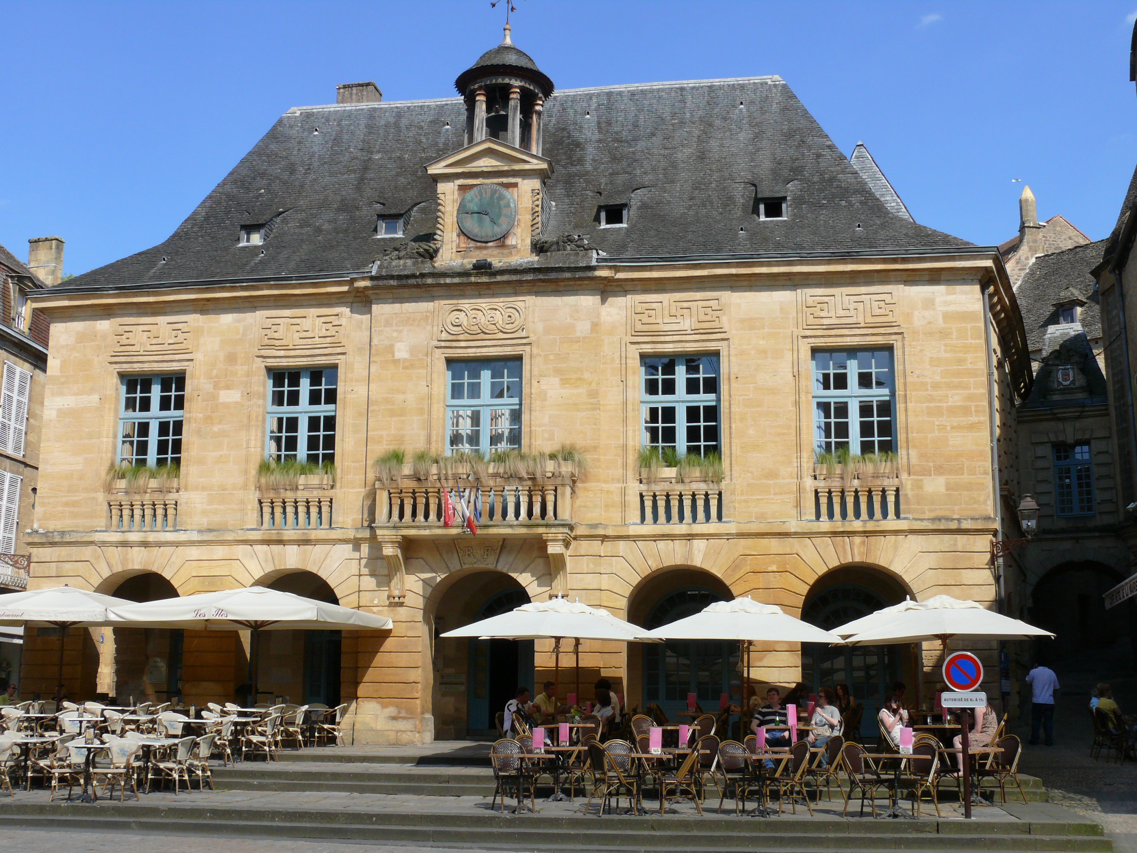 Sarlat-la-Canéda - Hôtel de ville